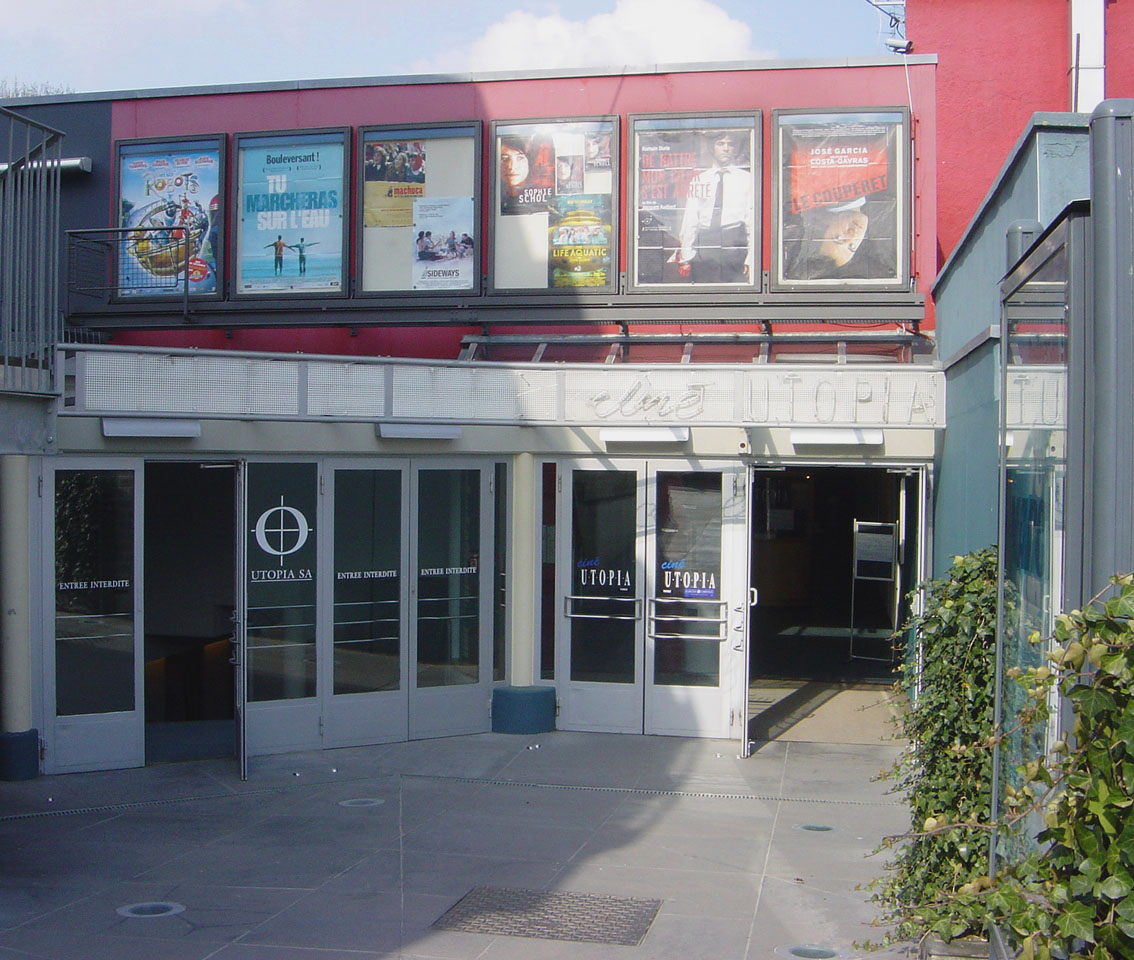 De Kino Utopia um Lampertsbierg.